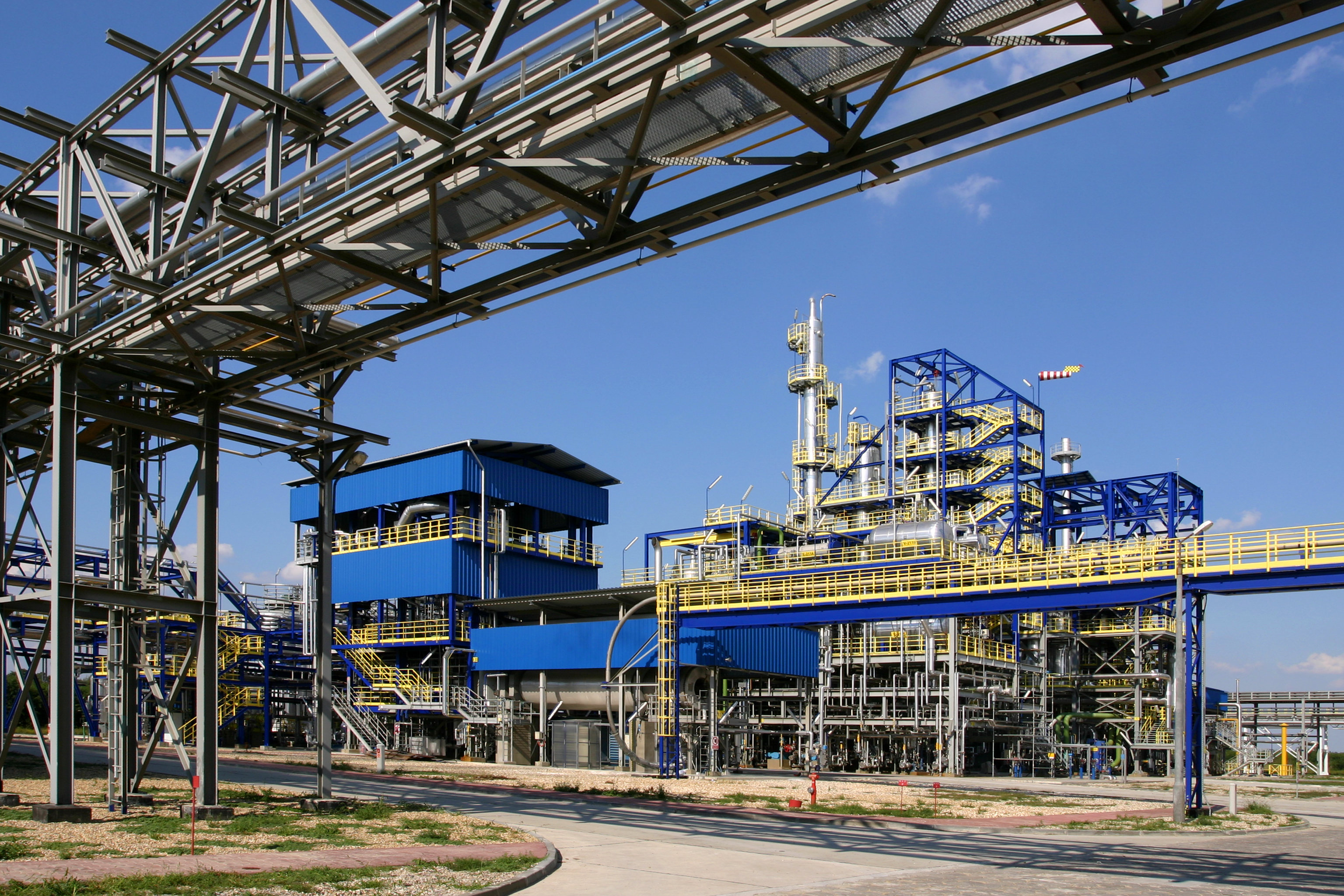 Instalacje w Zakładach Azotowych "PUŁAWY" S.A.